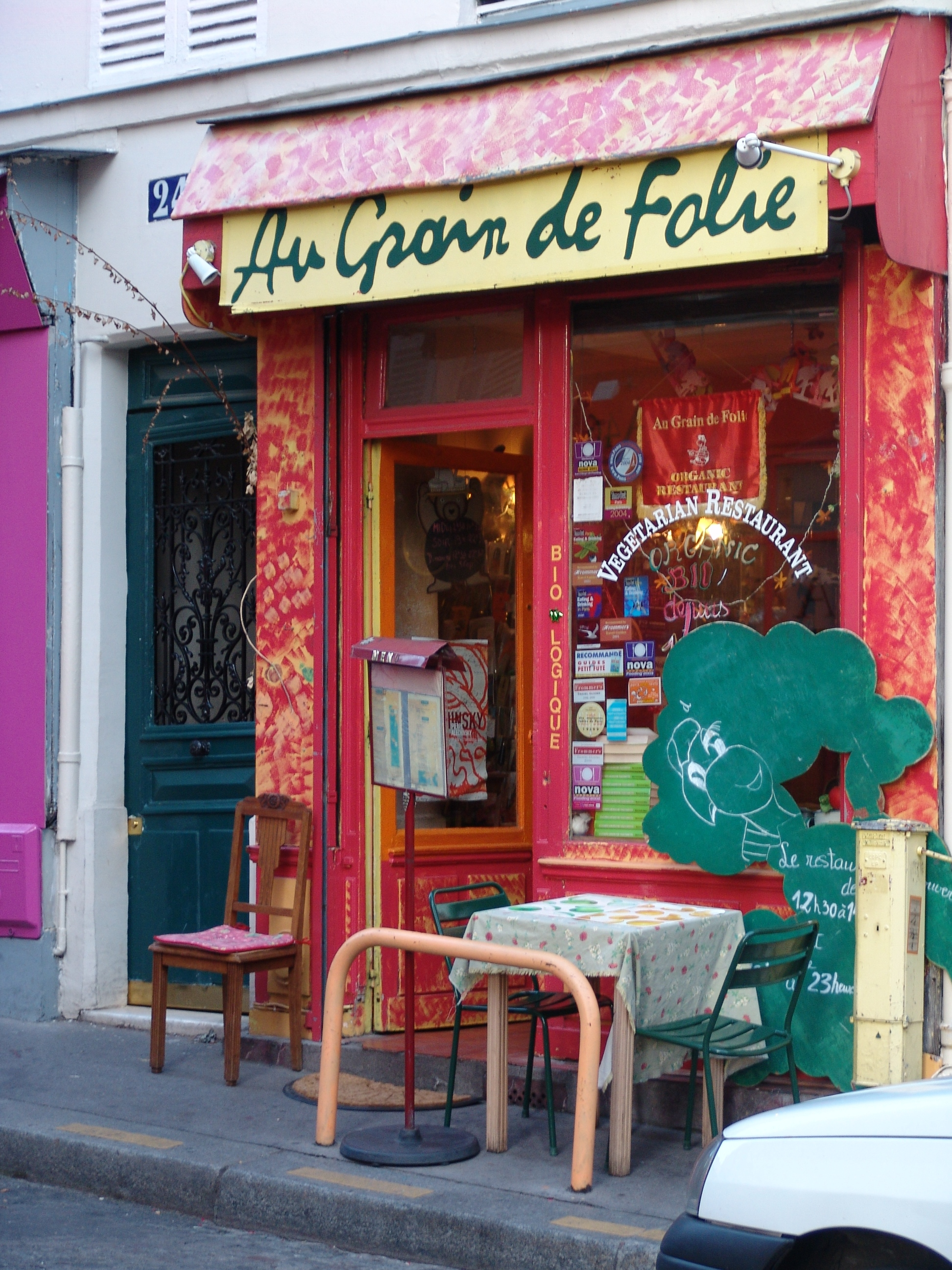 Au Grain de Folie, 24 rue Lavieuville, 75018 Paris, France - Restaurant végétarien bio.